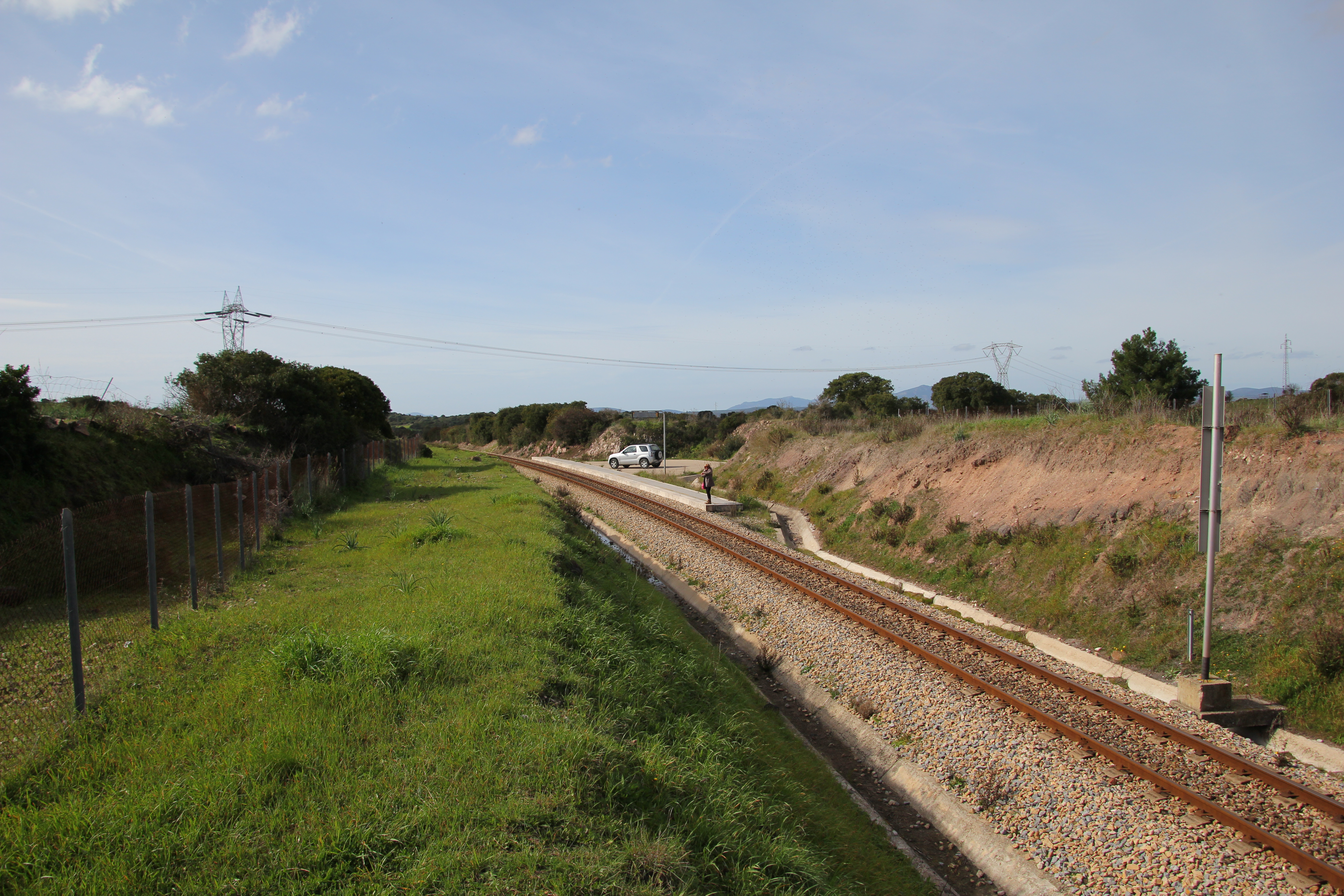 Sassari - Stazione di Arcone